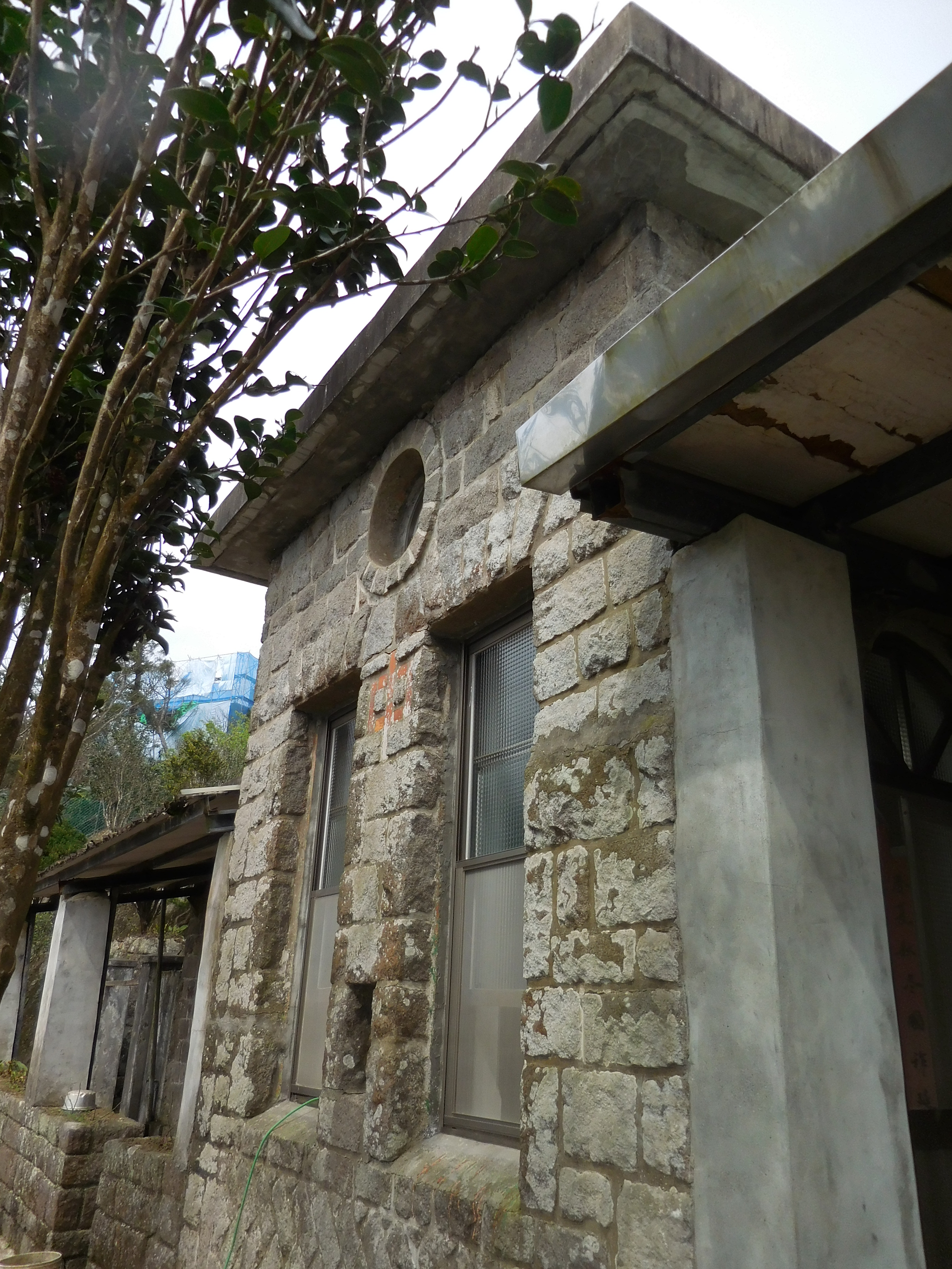 閻錫山故居 閻錫山晚年因懷念家鄉，並基於軍事防衛需要，選擇可居高臨下俯視淡水河口與台北盆地的防風山坡上，建造石頭屋「種能洞」及「紅磚屋」。特別的是，「種能洞」採山西窯洞建築，更融合中、日、西三式建築特長